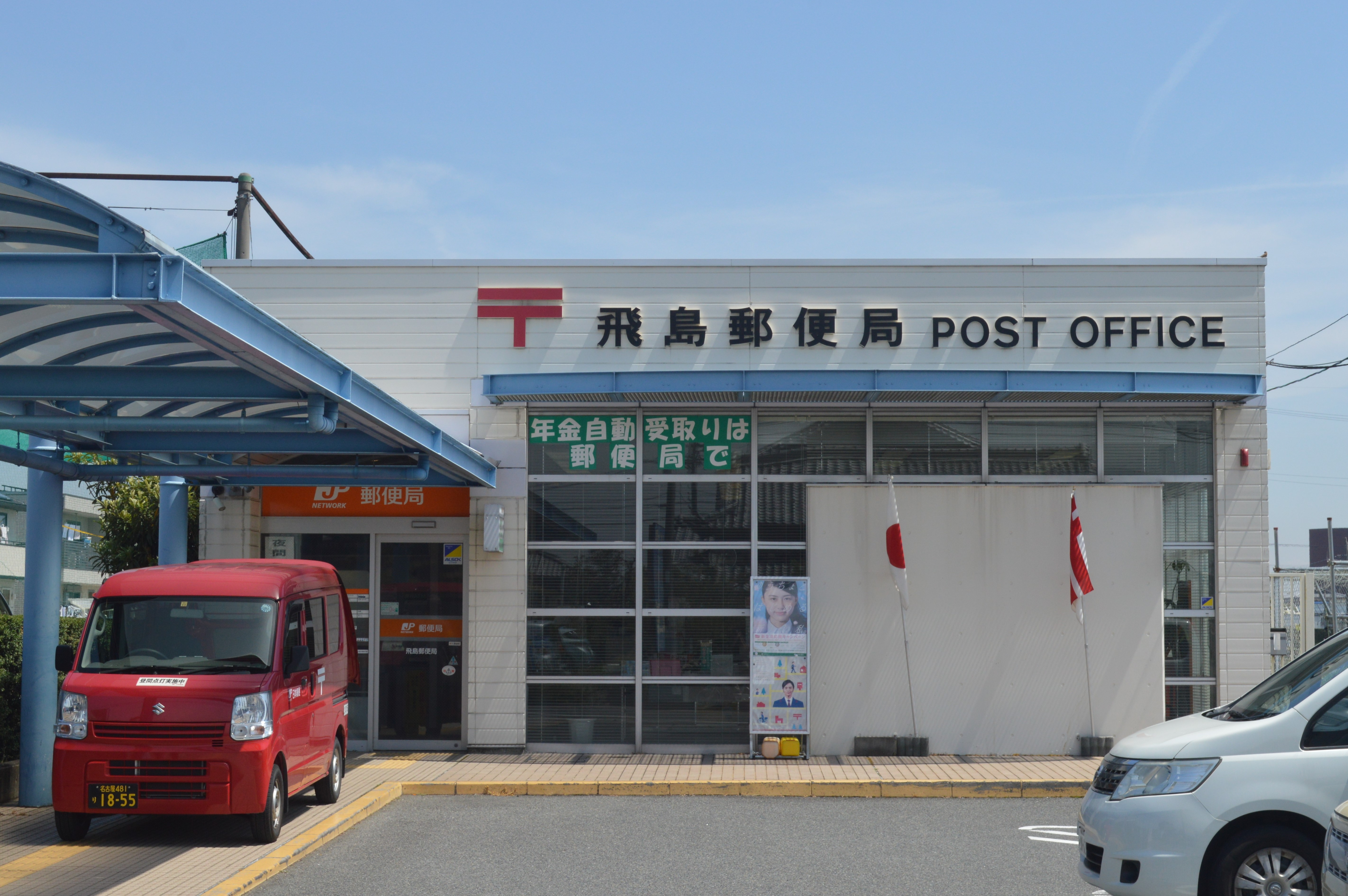 愛知県海部郡飛島村にある飛島郵便局。